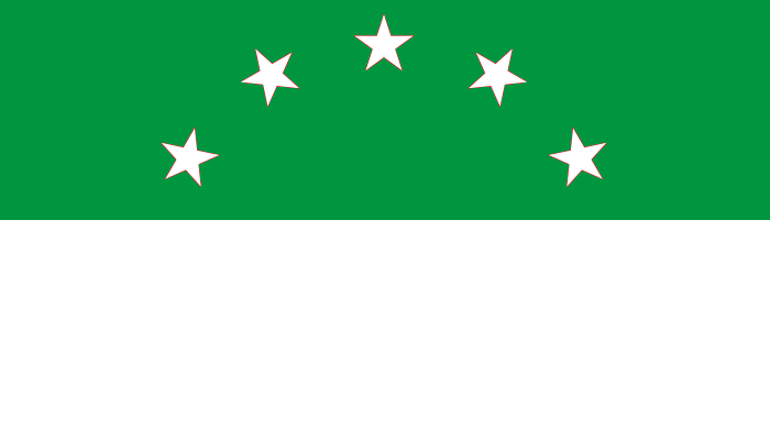 Bandera de Quinindé